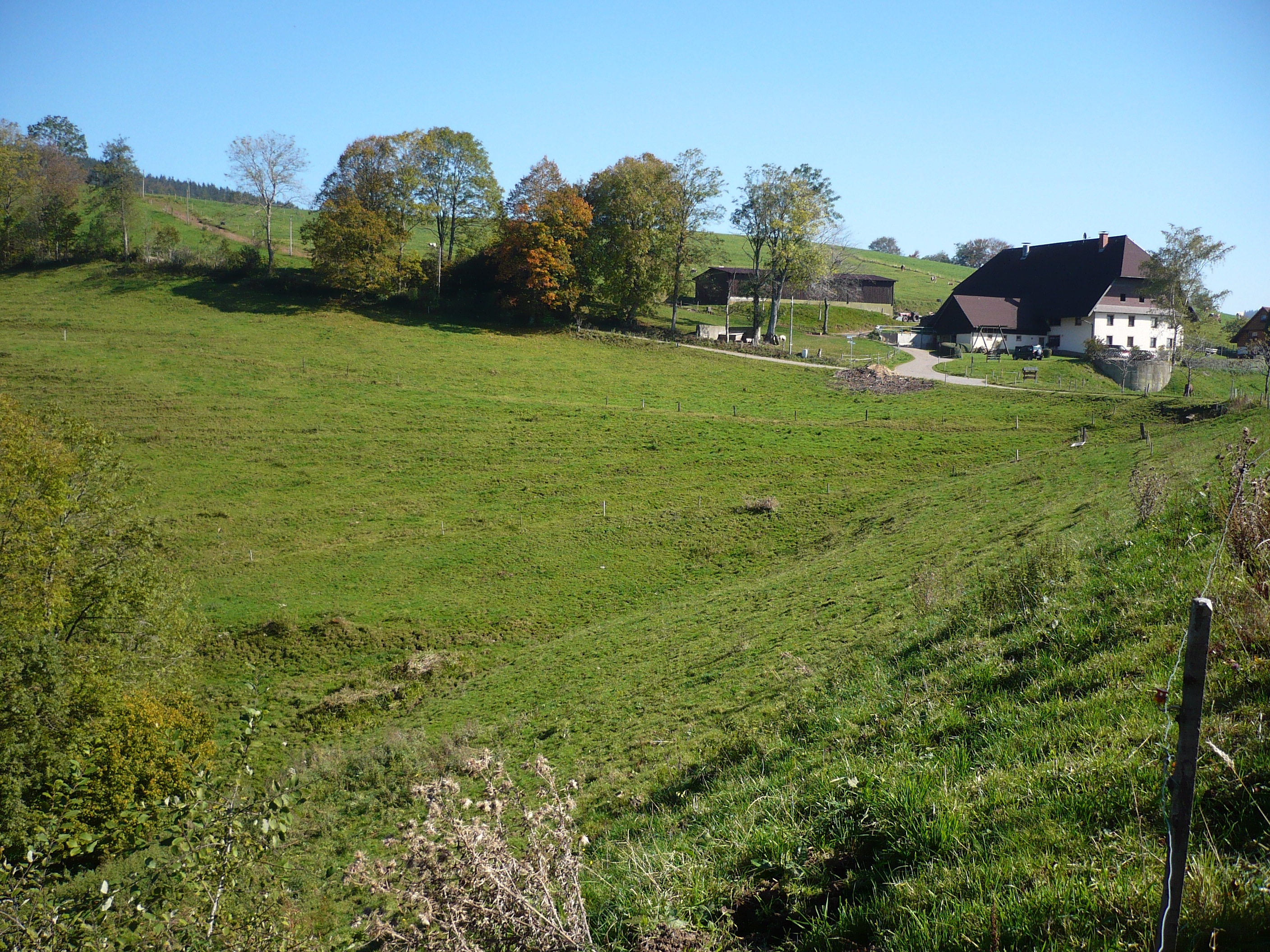 Nach Rohr stürzte das Wasser des Urgrabens ins Tal